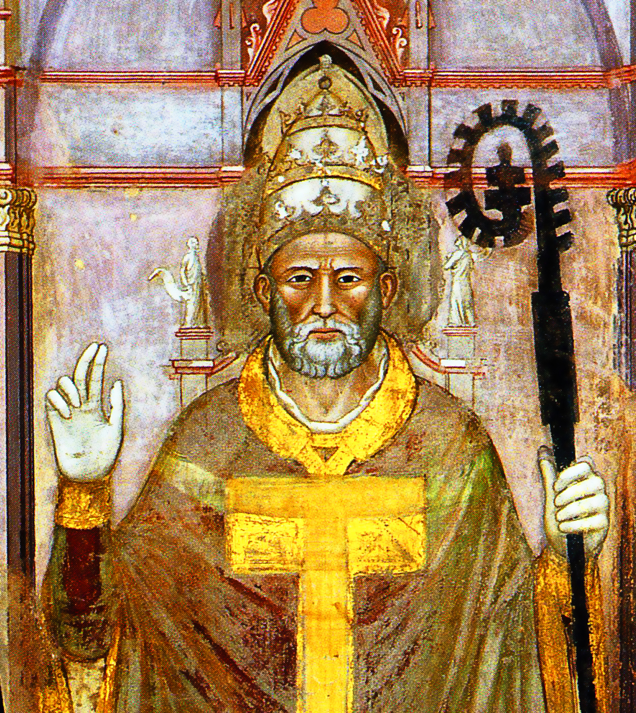 Innocent VI par Andrea di Bonaiuto